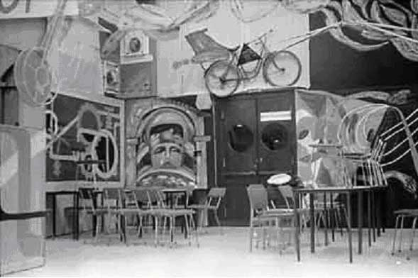 Eberswalde, Fasching